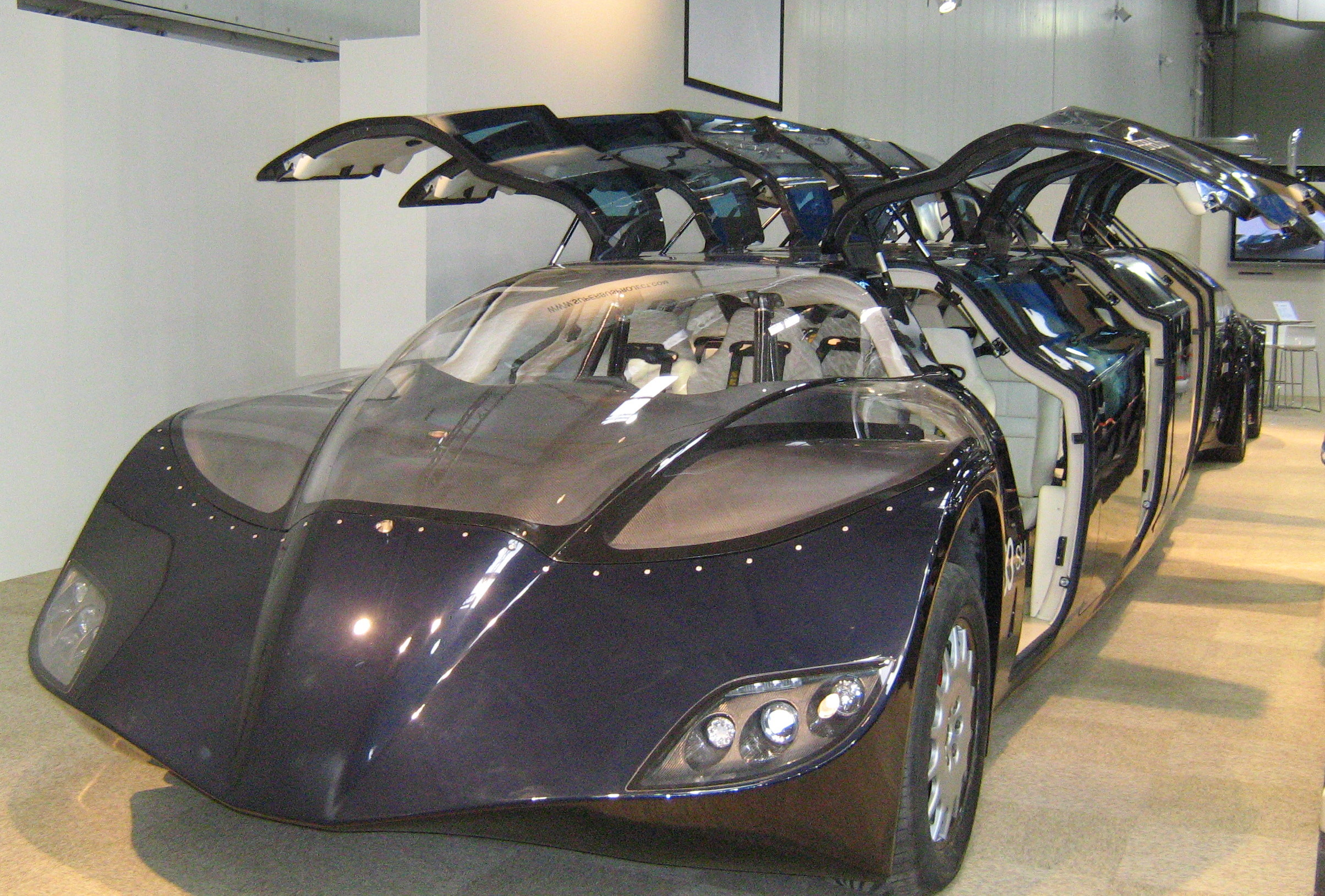 Projekt "Superbus" von Prf.Dr Ockels TU Delft (NL). 4 E-Motoren, 250 km/h, 26 Passagiere und eine reichweite von 200 km. 15 m lang und hat 16 Flügeltüren. (IAA 2010)